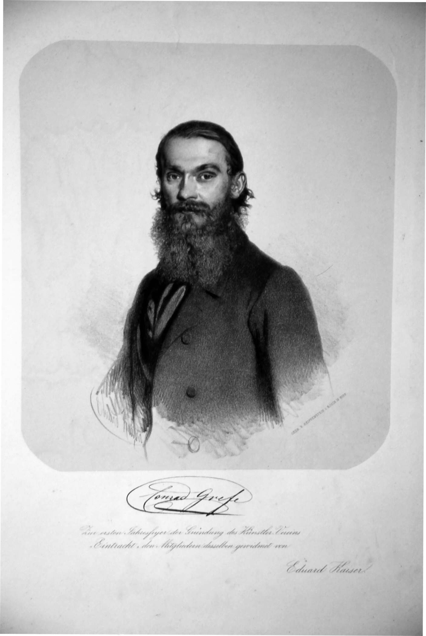 Conrad Grefe (1823-1907), österreichischer Maler, Lirhograph und Schriftsteller.Lithographie von Eduard Kaiser, ca. 1850